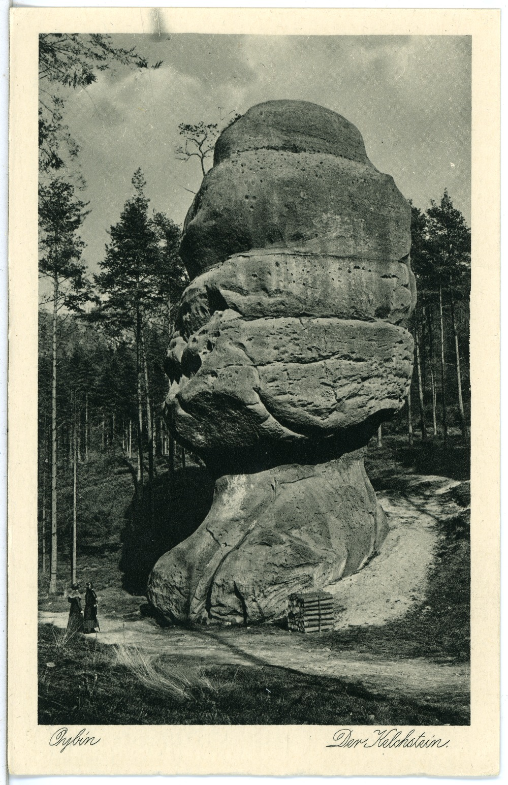 Oybin; Der Kelchstein This postcard is from publisher Brück & Sohn in Meißen ( postcard has a unique number 23031 and is available in a higher resolution at the publisher. This images was uploaded in a cooperation project between Wikipedians and the publisher.